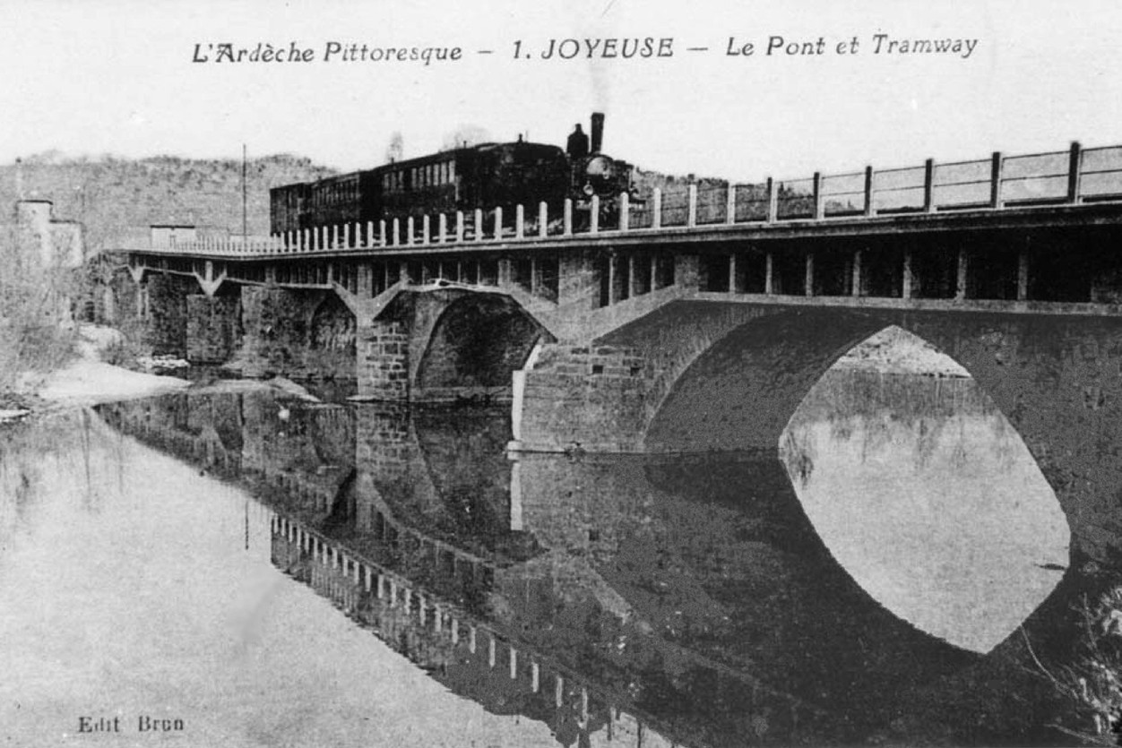 Carte postale ancienne du pont de Joyeuse dans le département de l'Ardèche vers 1900 avec le tramway.